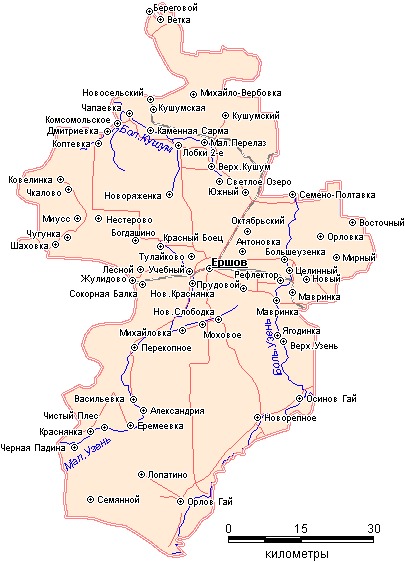 Географическая карта